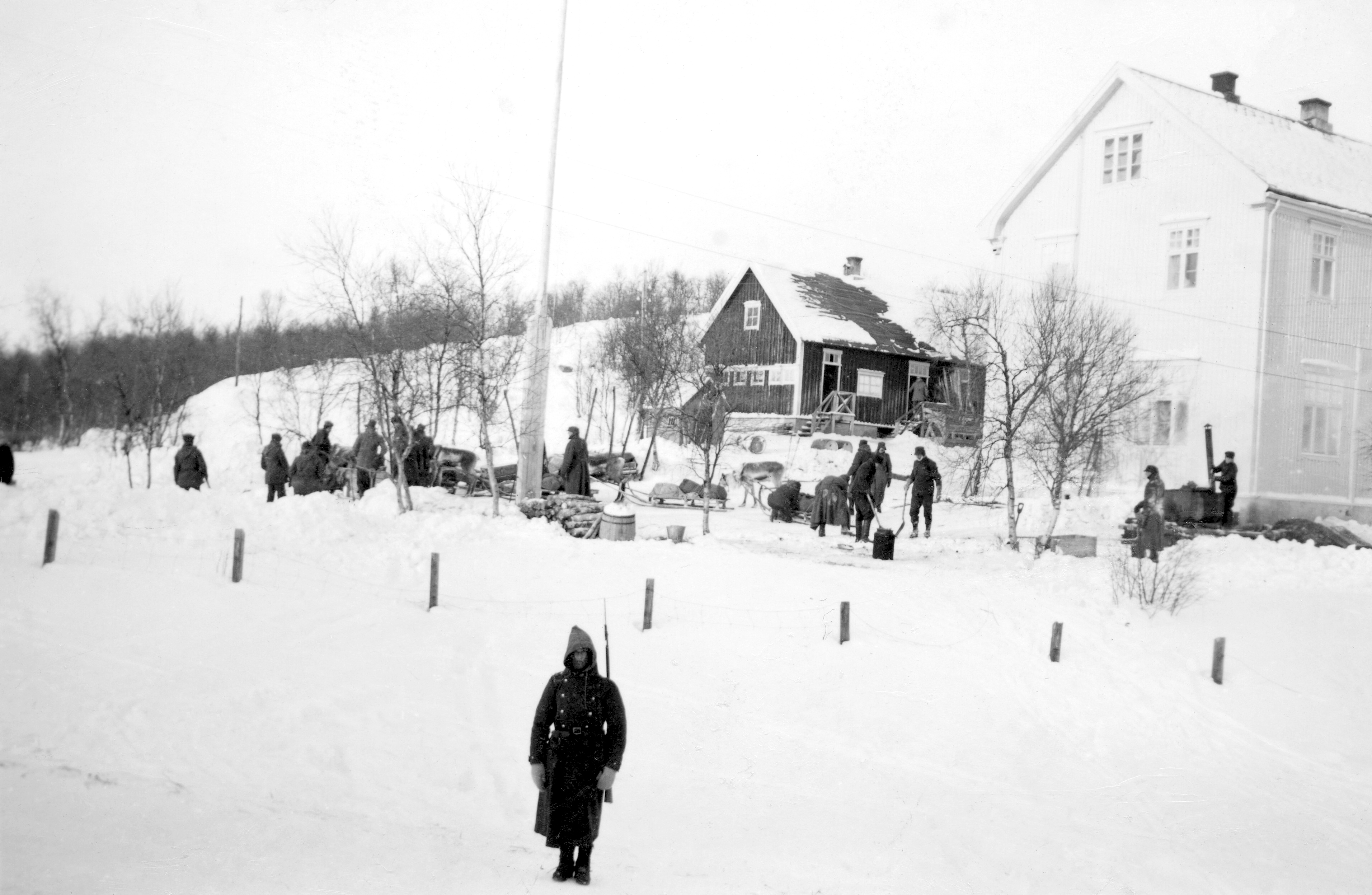 Format: Fotopositiv Dato / Date: 1940 Fotograf / Photographer: Kåre Hernes eller Trygve Gjervan Sted / Place: Elvenes, Finnmark Wikipedia: Nøytralitetsvakt Eier / Owner Institution: Trondheim byarkiv, The Municipal Archives of Trondheim Arkivreferanse / Archive reference: Tor.H42.B53.F3880 Fra Trygve B. Gjervans (1918 - 2004) samling. Gjervan var vernepliktig og tjenestegjorde ved Infanteriregiment 12 som holdt nøytralitetsvakt ved grensen til Sovjetunionen og Finland i Finnmark i 1940. Da tyskerne invaderte Norge 9. april ble IR 12 sendt sørover, og under general Carl Gustav Fleischer (1883 - 1942) ble de satt inn i det norske motangrepet ved Gratangen nær Narvik, hvor IR 12 led store tap. Fotograf er ifølge Gjervans notater hovedsakelig Kåre Hernes. Trygve Gjervans egen tekst til bildet: Folkeskolen i Elvenes hvor 3.de kompanis hovedstyrke var forlagt. Det var en kald jobb å gå vakt på dette stedet like ved Pasvikelva. Feltkjøkkenet var til venstre for flaggstanga - meget luftig plassering.